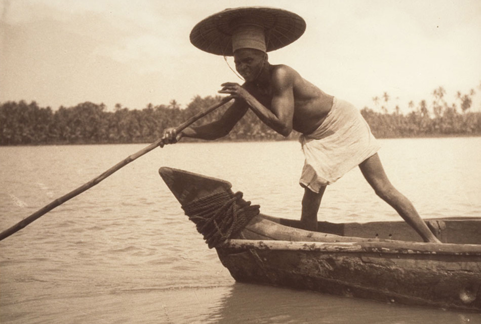 മലബാറിലെ ഏതോ കായലിൽ വള്ളമൂന്നുന്ന തോണിക്കാരൻ: ക്ലൈൻ & പേയേൾ ഫോട്ടോ സ്റ്റുഡിയോ, മദ്രാസ്, ഇന്ത്യ (1921-1940)